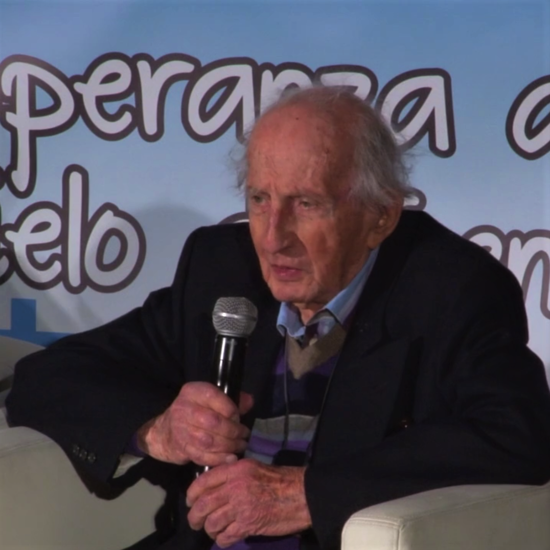 Eugenio Carmi a Genova, nel convegno del 6 novembre 2015: «Nelle case la speranza di una vita migliore sotto il cielo di Genova» Laboratorio delle Idee